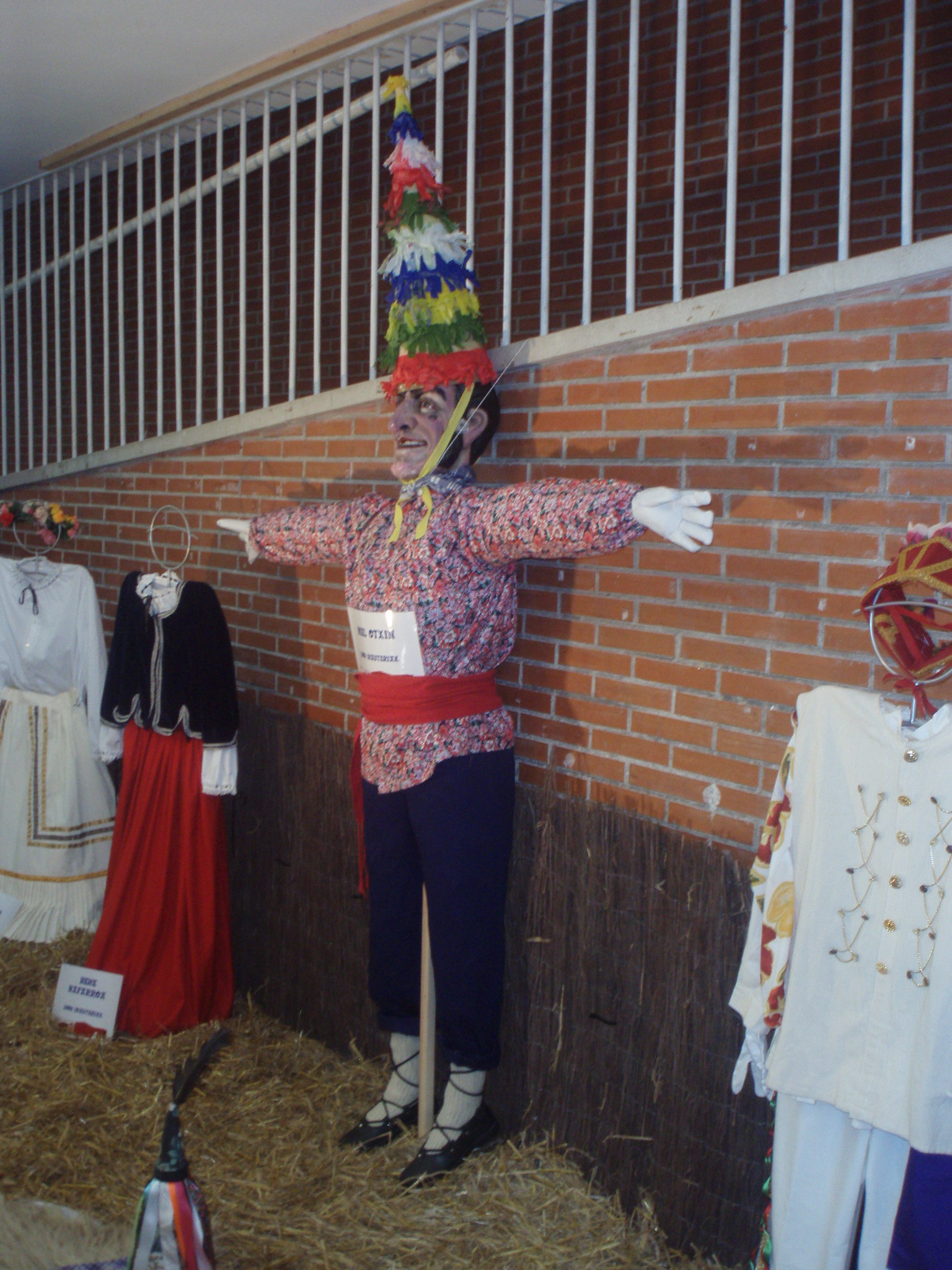 Miel Otxin, figura principal del carnaval de Lantz, expuesto en la ikastola Amaiur de Iruñea-Pamplona.